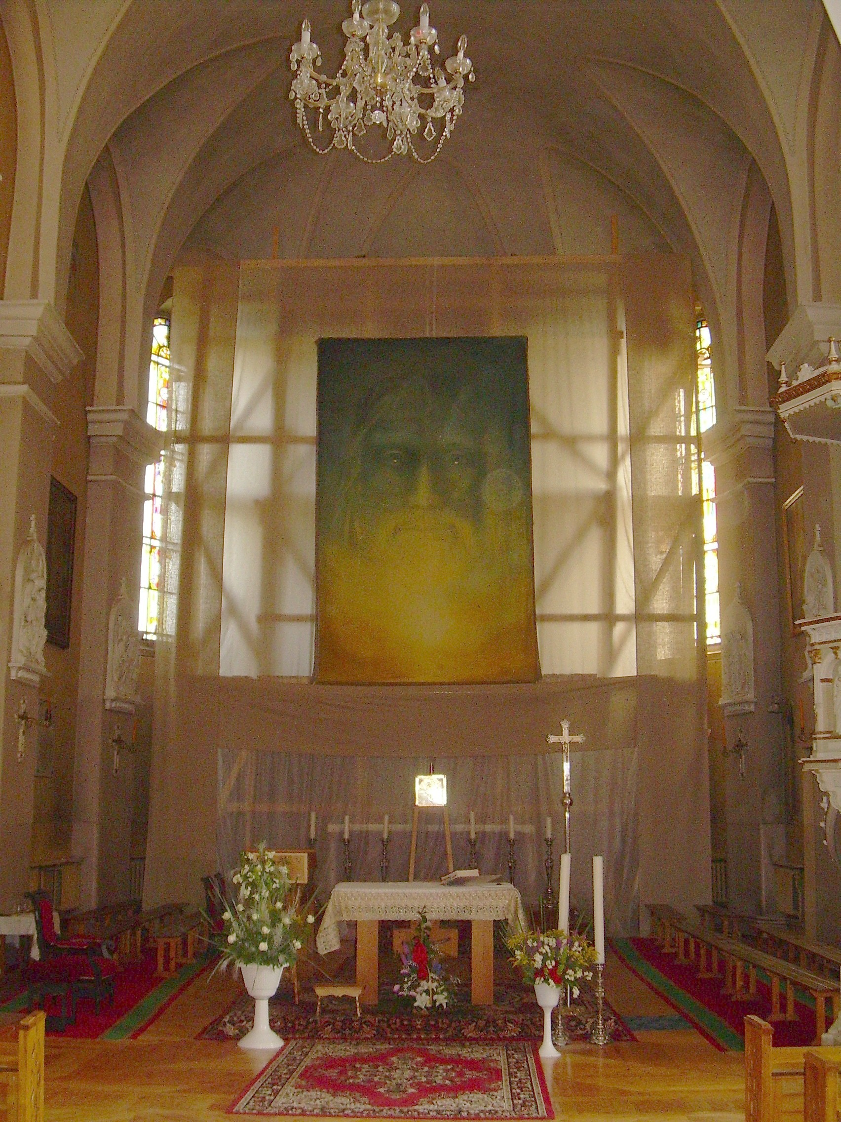 Šeduvos Šv. Kryžiaus Atradimo bažnyčia